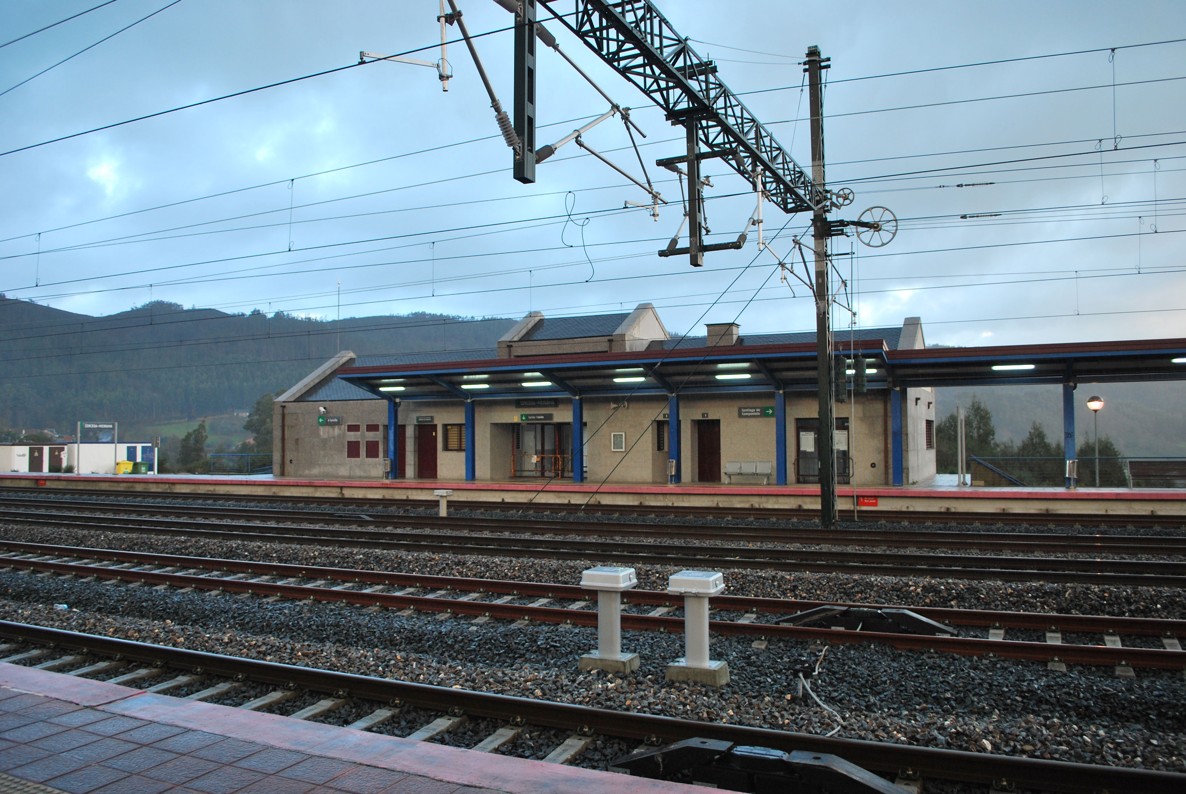 Estación AVE Cerceda-Meirama, A Coruña Galiza Spain